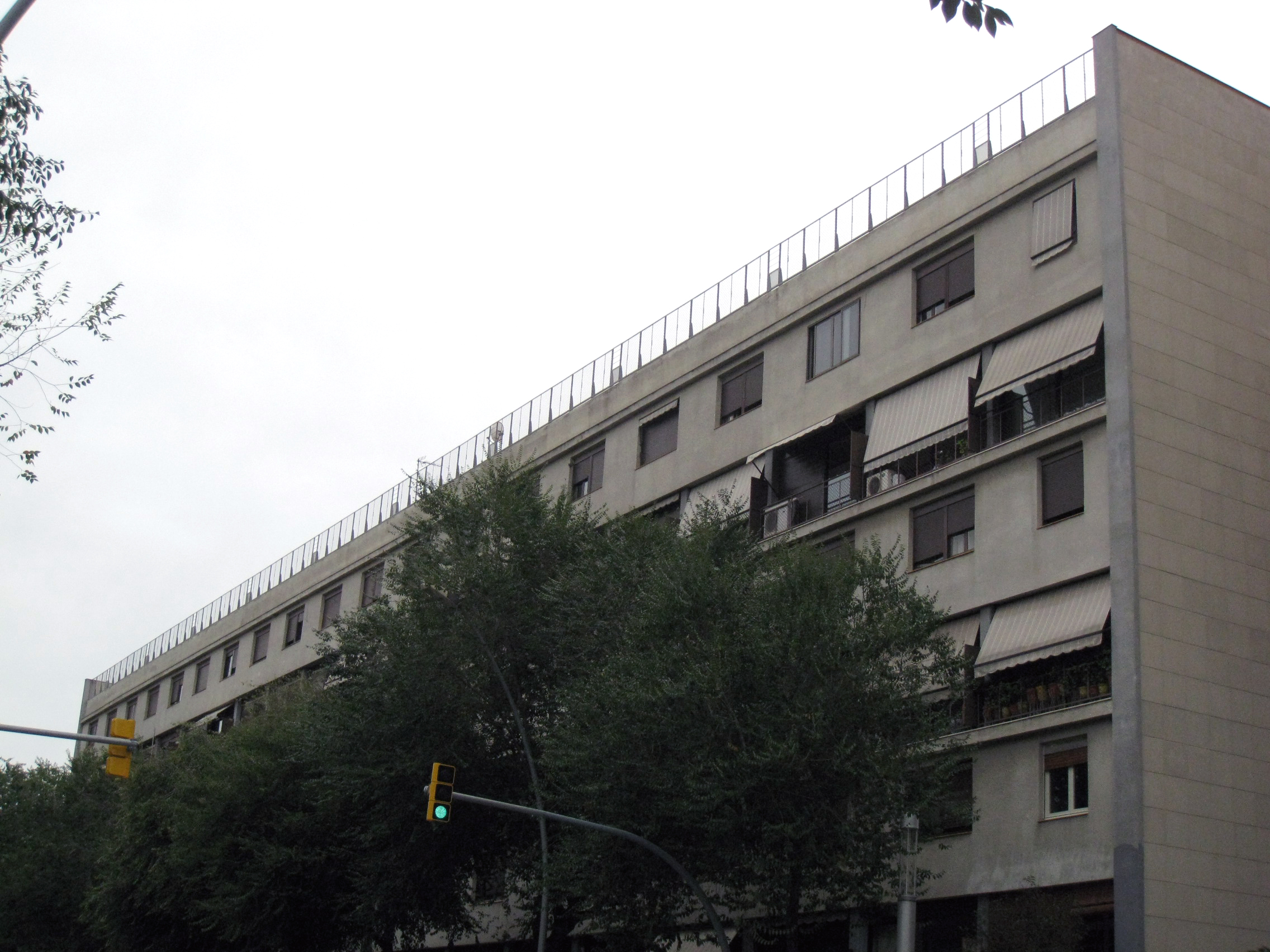 Casa Bloc, edifici racionalista construït pels arquitectes Josep L. Sert, Joan B. Subirana i Josep Torres (1932-1936) a Sant Andreu (Barcelona), a l'avinguda de Torras i Bages núm. 91-105.